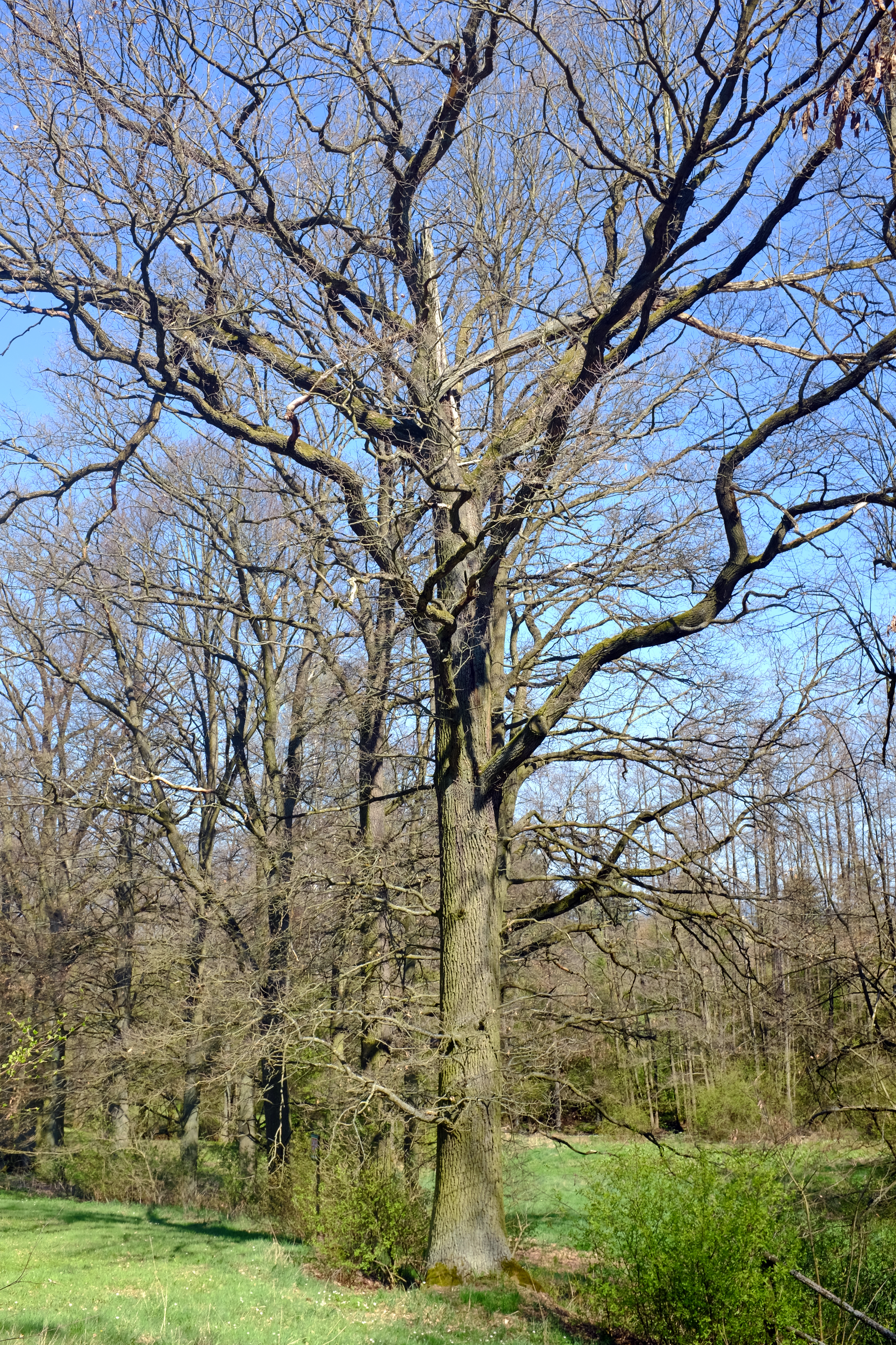 Alej památných stromů - Alej Doubrava - okres Cheb